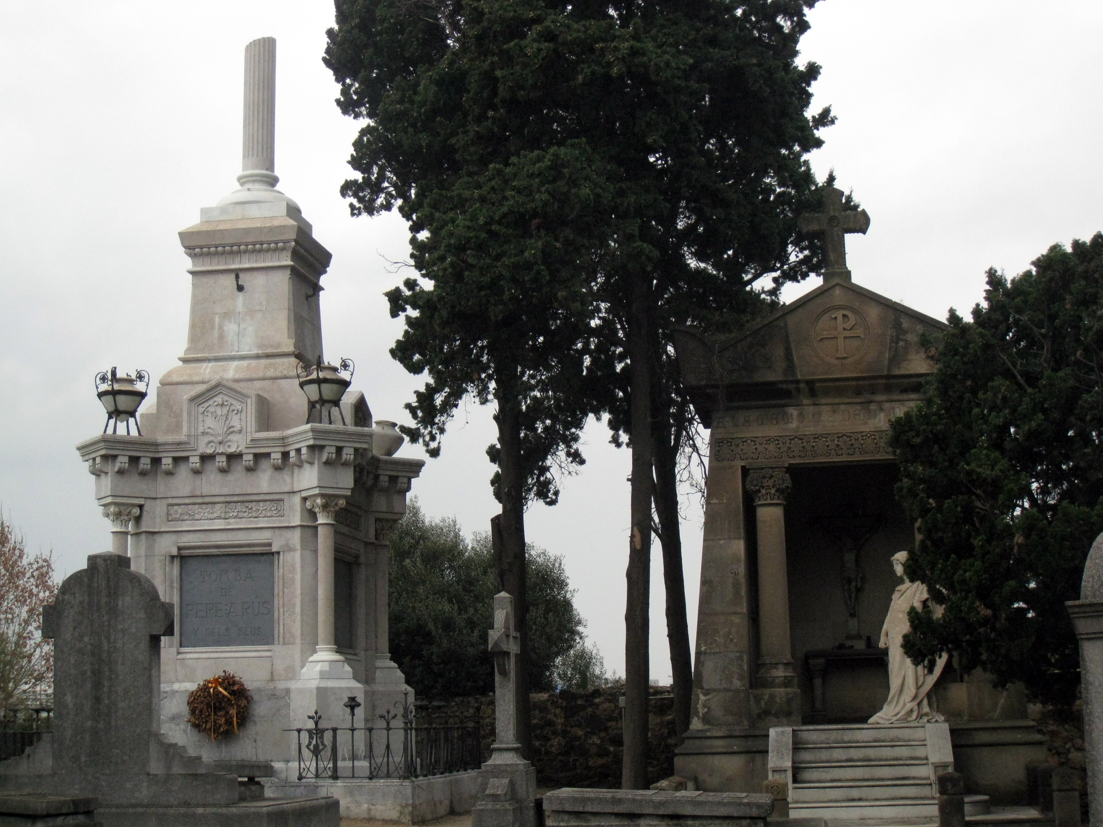 Cementiri de Montjuïc (Barcelona) Object location41° 21′ 09.77″ N, 2° 09′ 10.94″ E